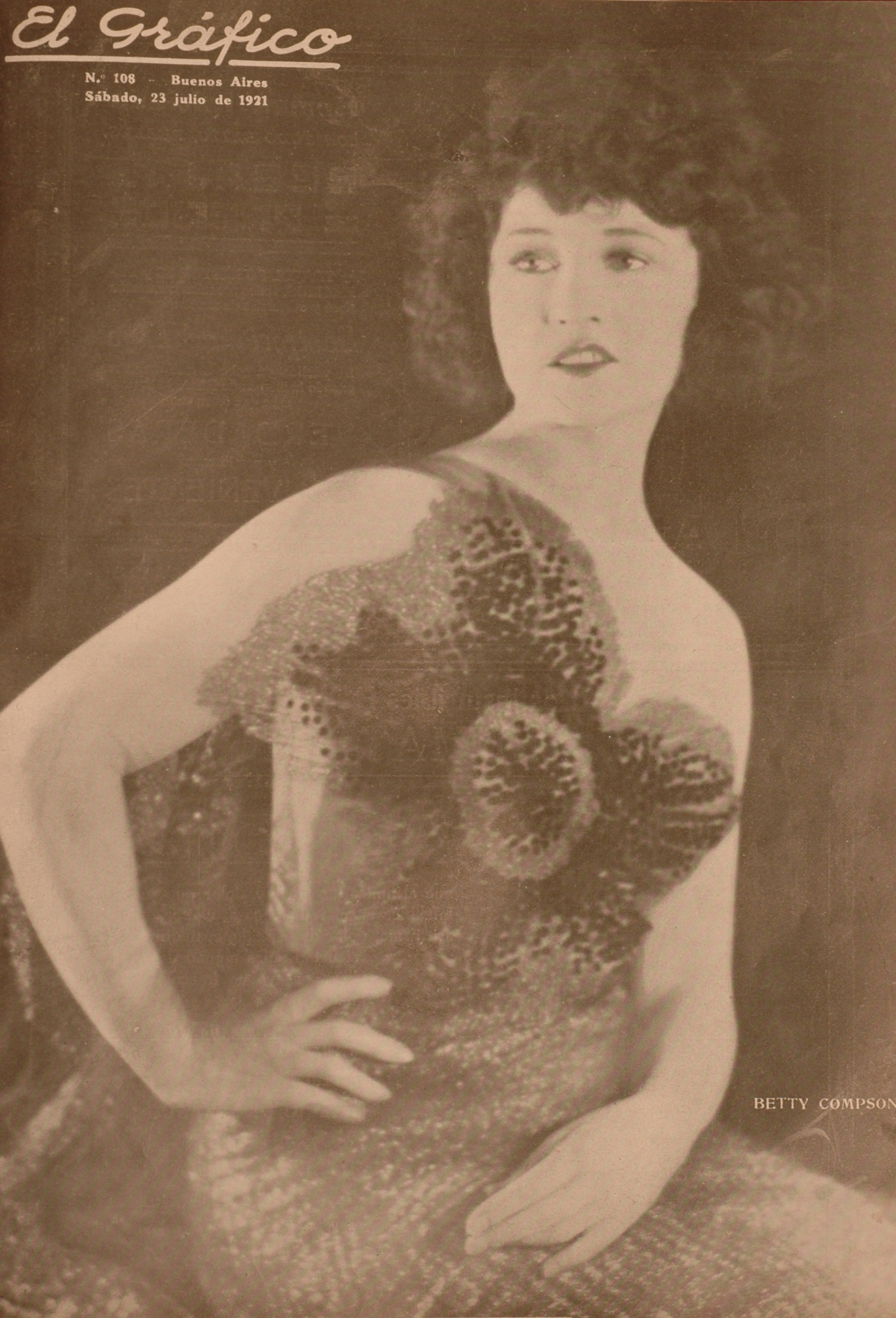 El Grafico del 23 de Julio de 1921. Edicion 108